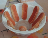 Charlotte, 1ere étape